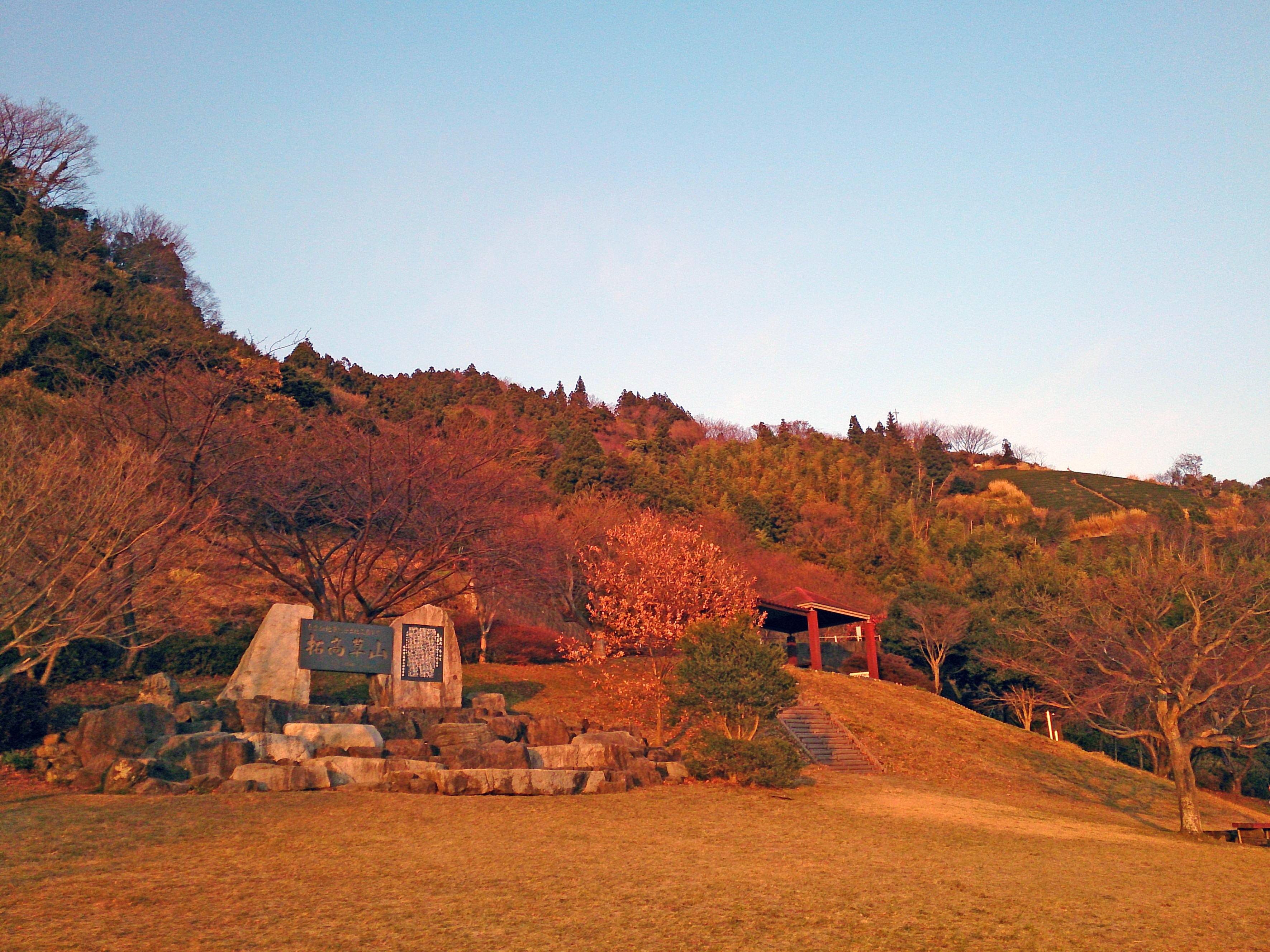 静岡県焼津市笛吹段公園